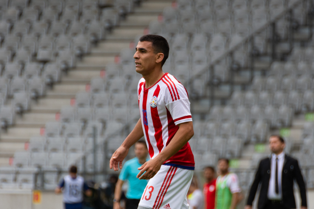 Júnior Alonso